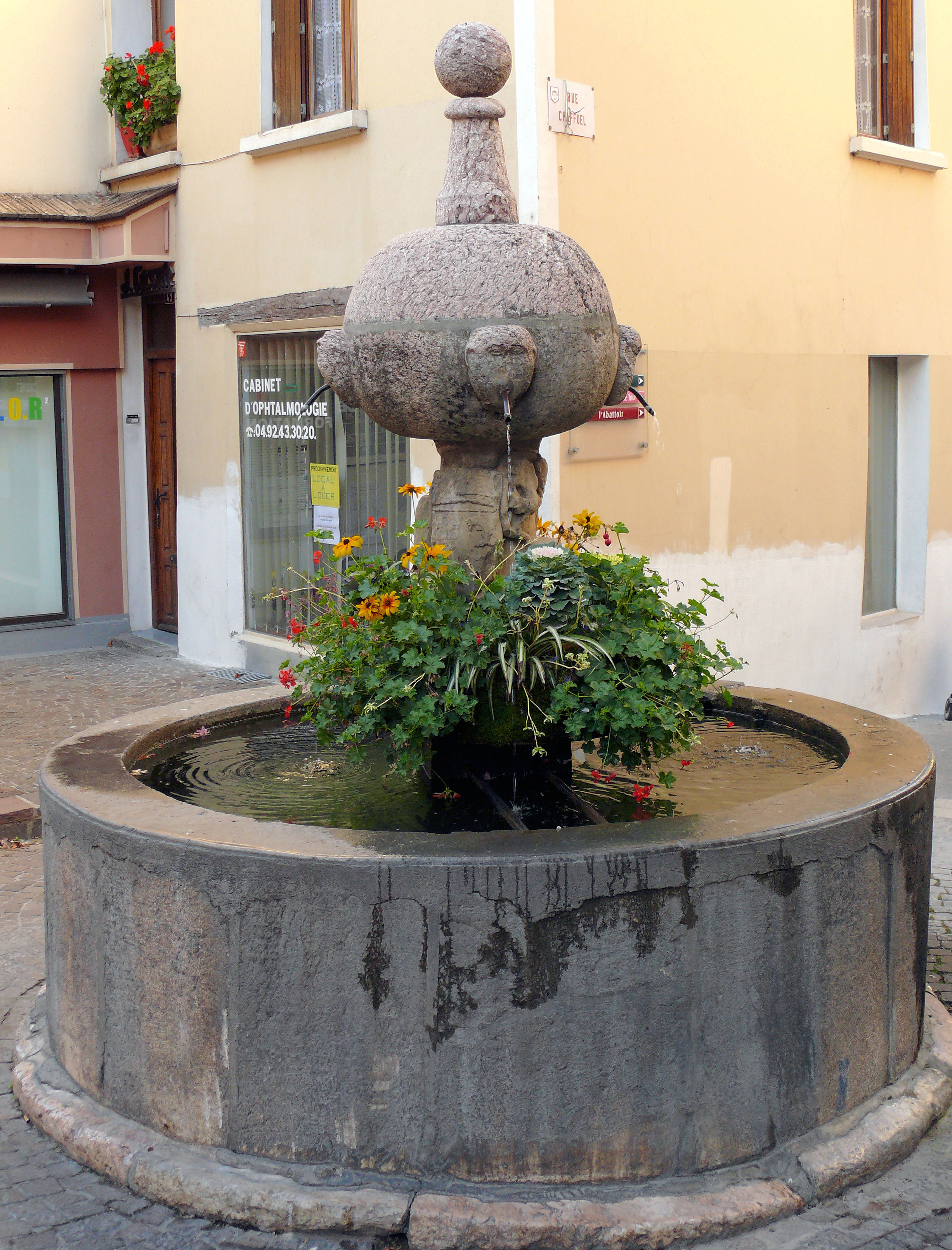 Embrun - Fontaine, place Font-Guers, rue de la Liberté, rue Chaffuel et rue Saint-Hilaire